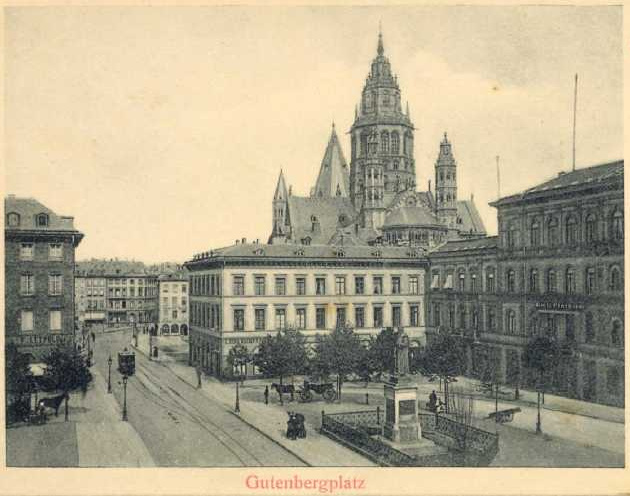 Der Gutenbergplatz in Mainz mit Blickrichtung nach Osten. Es sind Schienen der Mainzer Pferdebahn, die von 1883 bis 1904 verkehrte, zu erkennen. Rechts befindet sich auf dem Bild das Gutenberg-Denkmal.